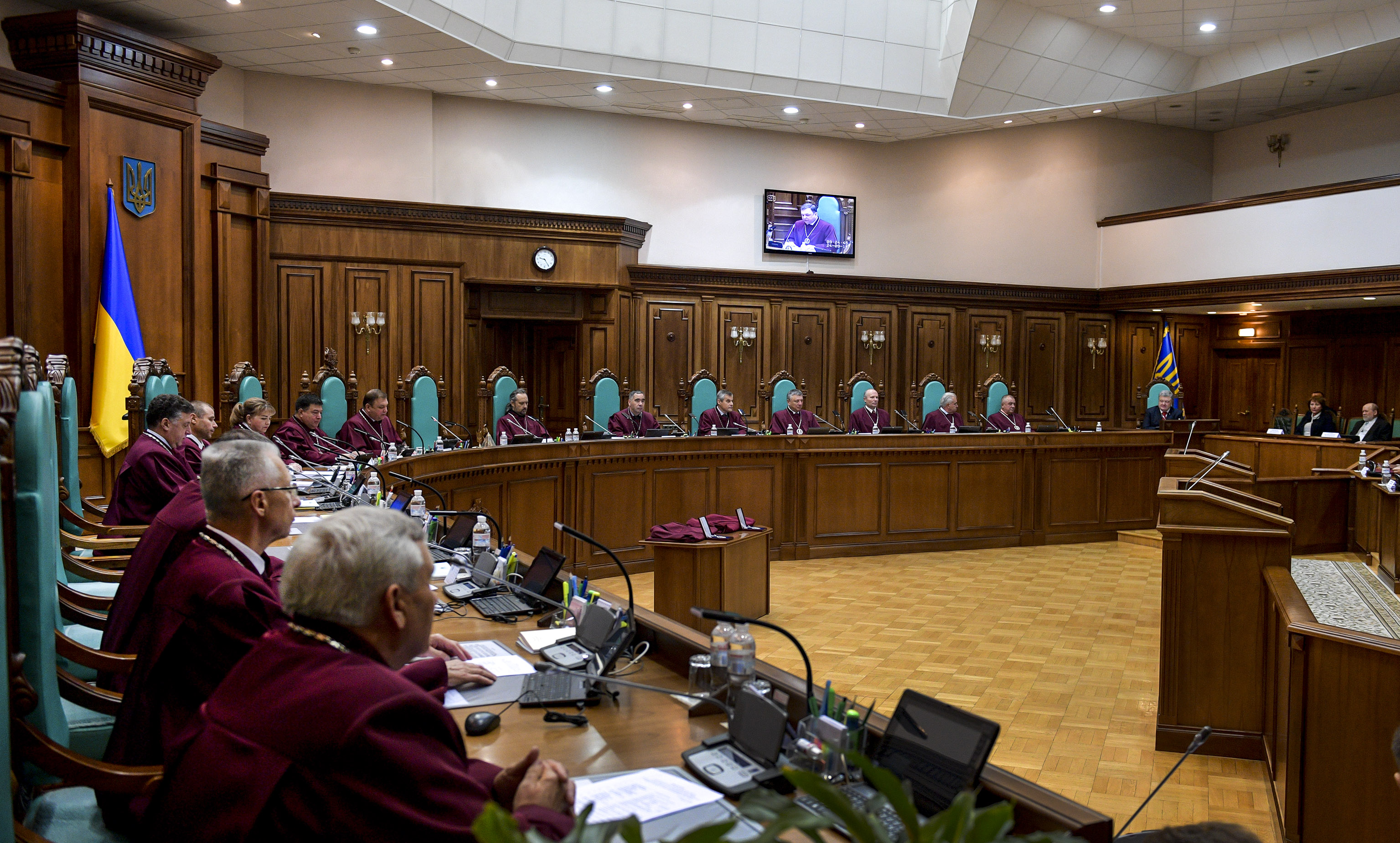 Спеціальне пленарне засідання Конституційного суду України, під час якого склали присягу два новообраних судді Конституційного суду Ірина Завгородня та Олег Первомайський